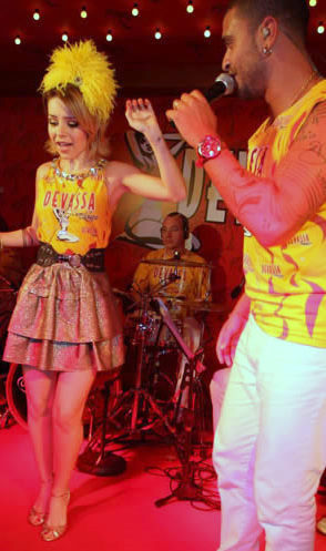 Sandy canta e samba com o cantor Diogo Nogueira no camarote da cervejaria que a contratou como garota propaganda.